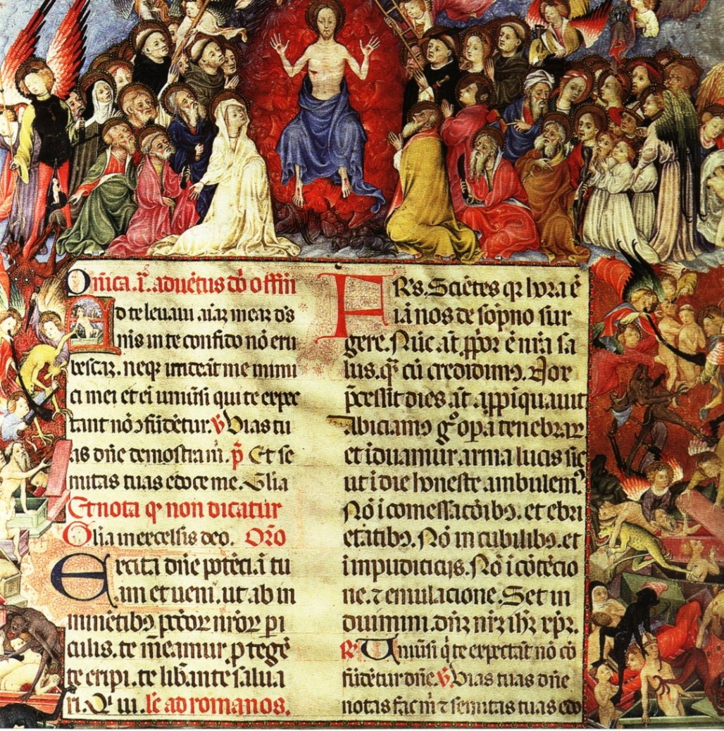 Ramon Destorrents: Misal de Santa Eulàlia (1401-05, Catedral de Barcelona).